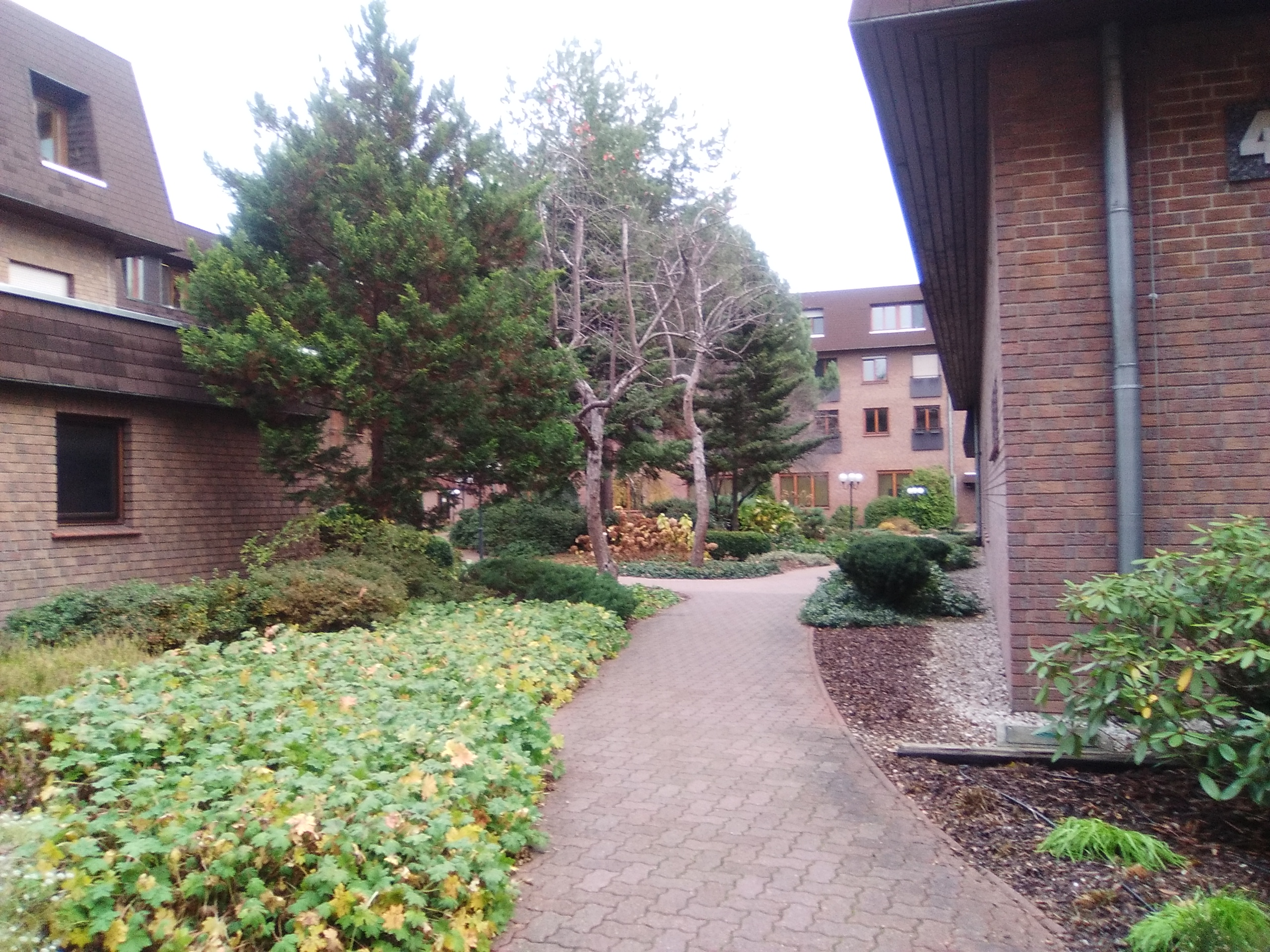 Biuro oddziału Świadków Jehowy w Polsce, Nadarzyn